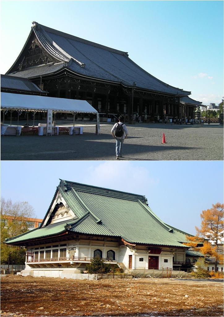 中文（中国大陆）: 新京东本愿寺